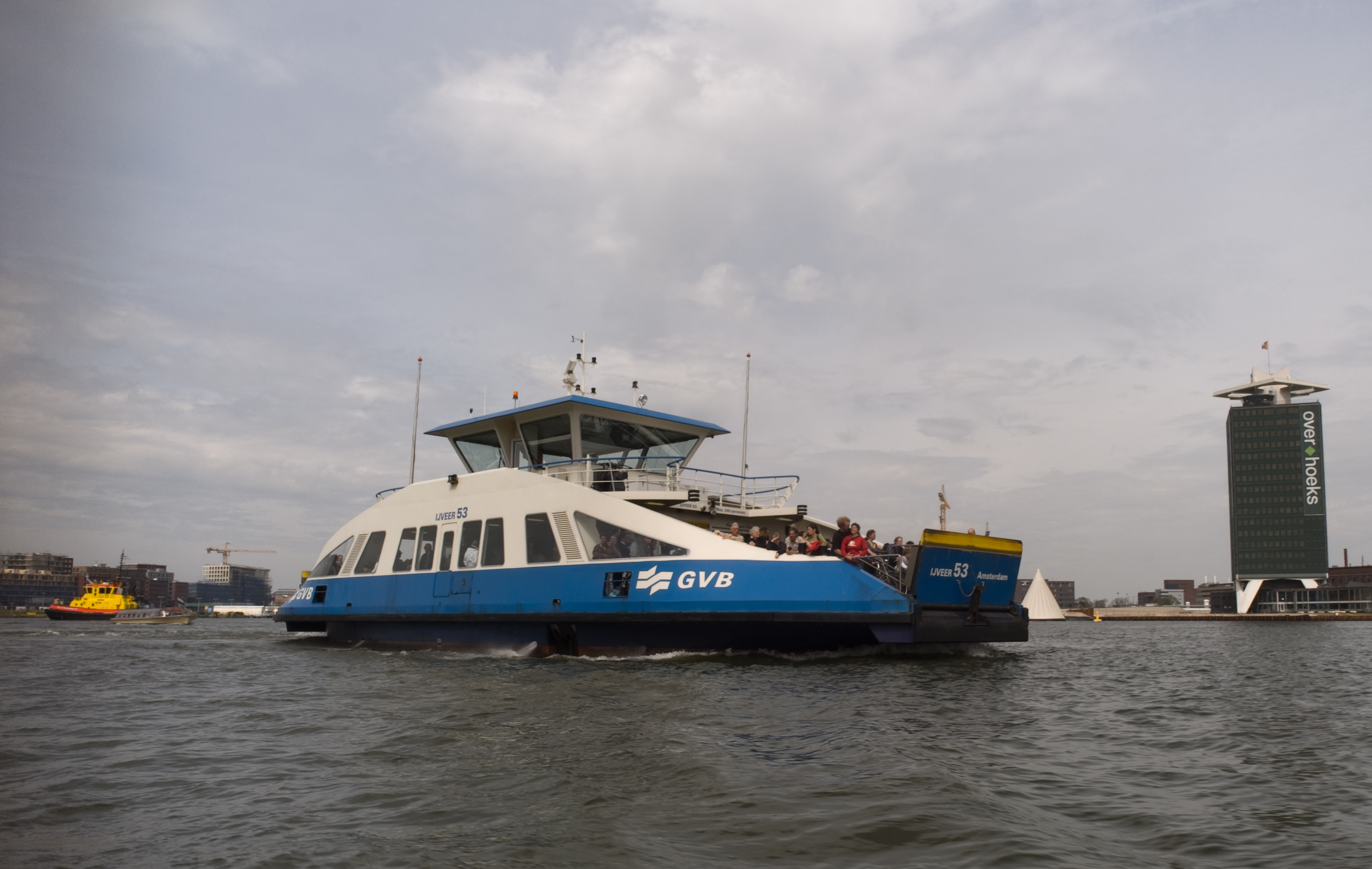 Amsterdam ferry - EPSN2005lr